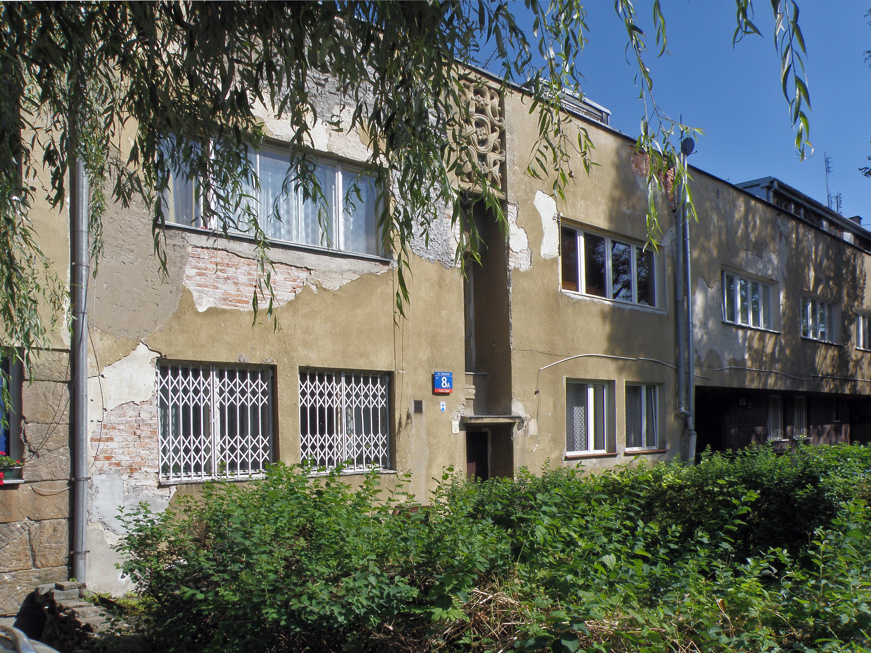 Dom (segment), wybudowany ok. 1930 r., ul. Katowicka 8 A (977 A z 13.06.1979), Warszawa.